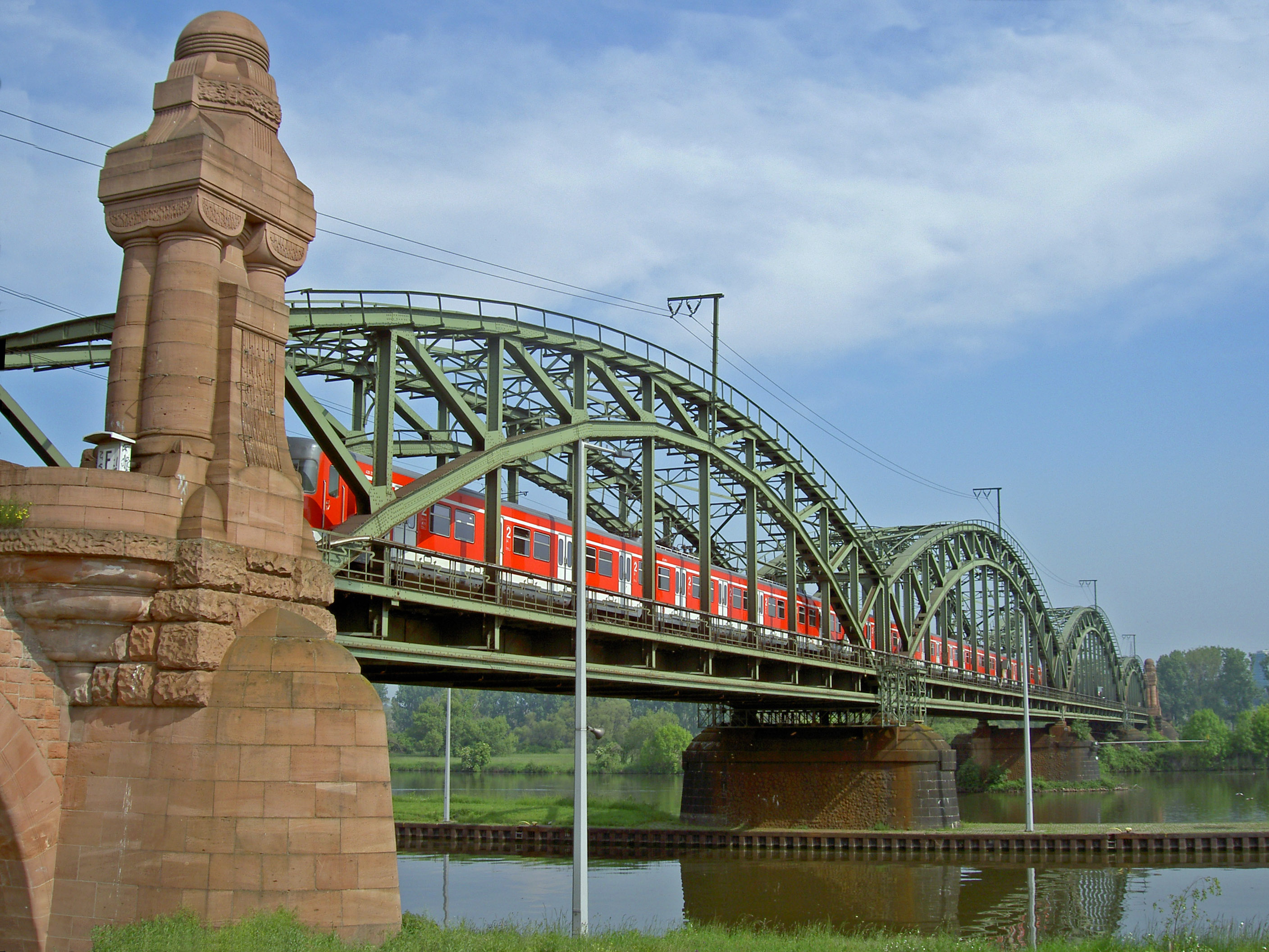 Germany Ginsheim-Gustavsburg Main Railroad Darmstadt-Wiesbaden